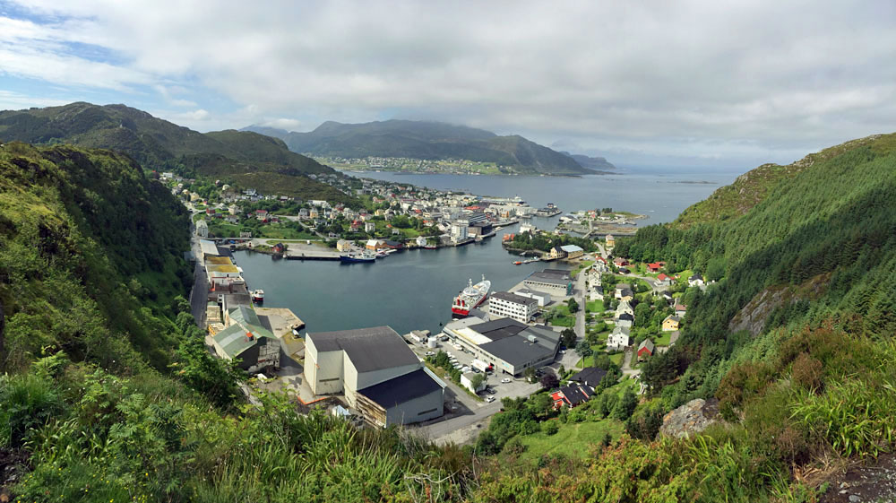 Aussicht vom Heid tursti auf Fosnavåg.